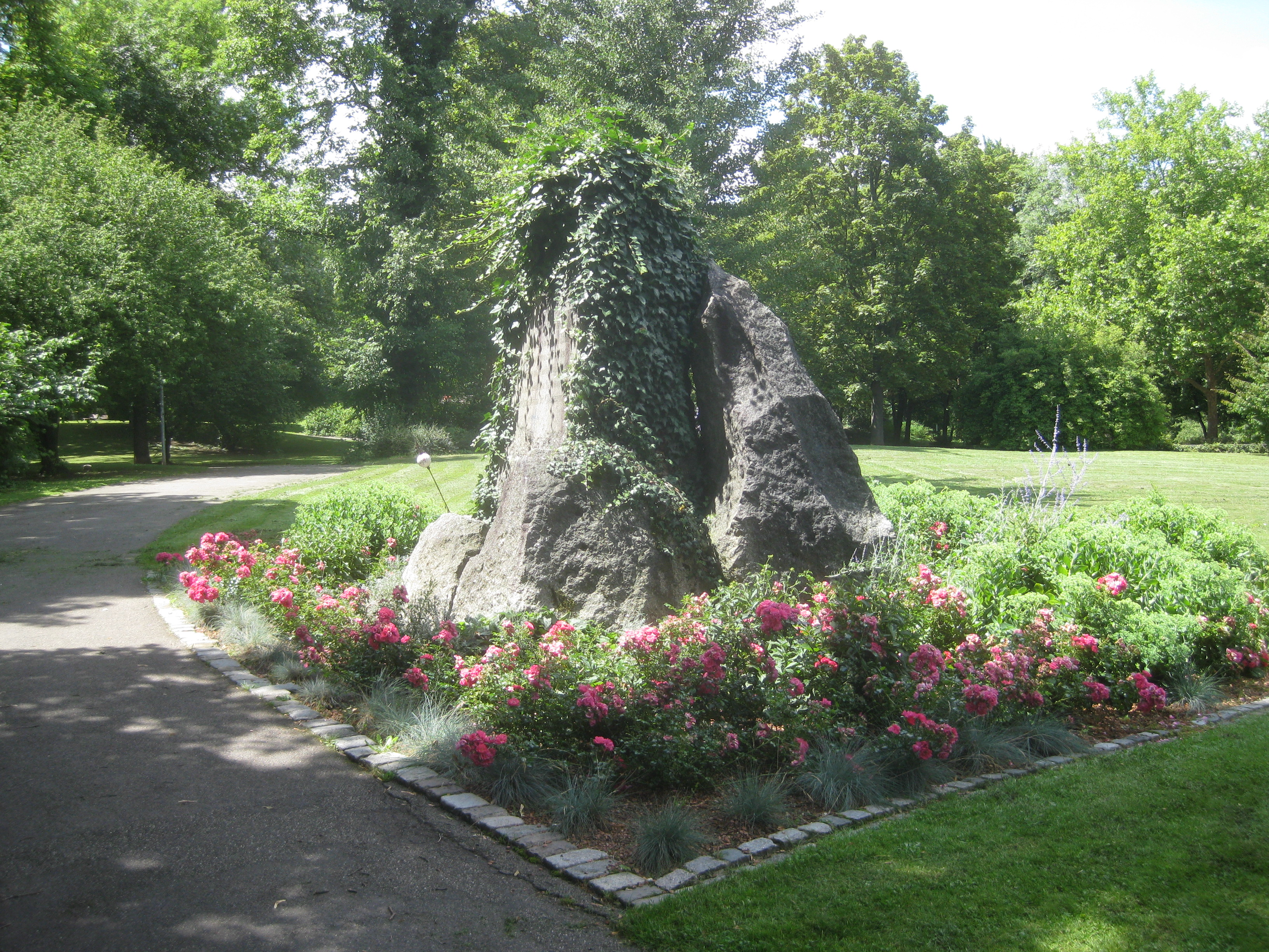 Stuttgart, Villa Berg, Park, Champigny-Denkmal.